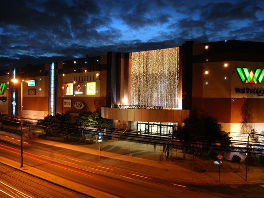 West shopping - Campo grande, RJ